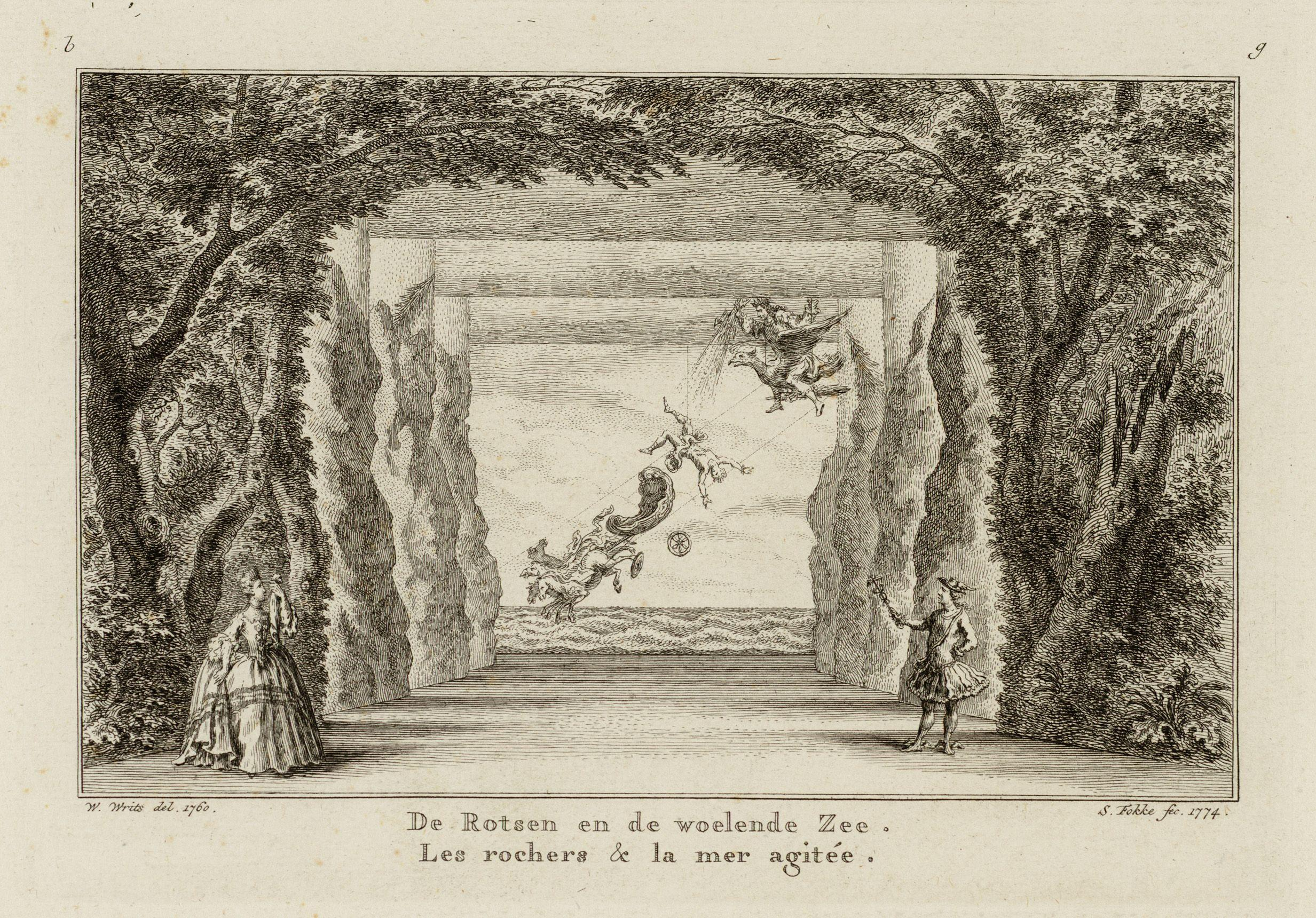 Beschrijving Interieur van de Schouwburg Keizersgracht 384 met het decor van De rotsen en de woelige zee, met vierde bedrijf van het zesde toneel van Vondels 'Faëton' Datum voorstelling: 1760. Techniek: ets. Documenttype prent Vervaardiger Fokke, Simon (1712-1784) Writs, Willem Collectie Collectie Stadsarchief Amsterdam: tekeningen en prenten Datering 1774 t/m 1804 Geografische naam Keizersgracht Inventarissen Afbeeldingsbestand 010097003345